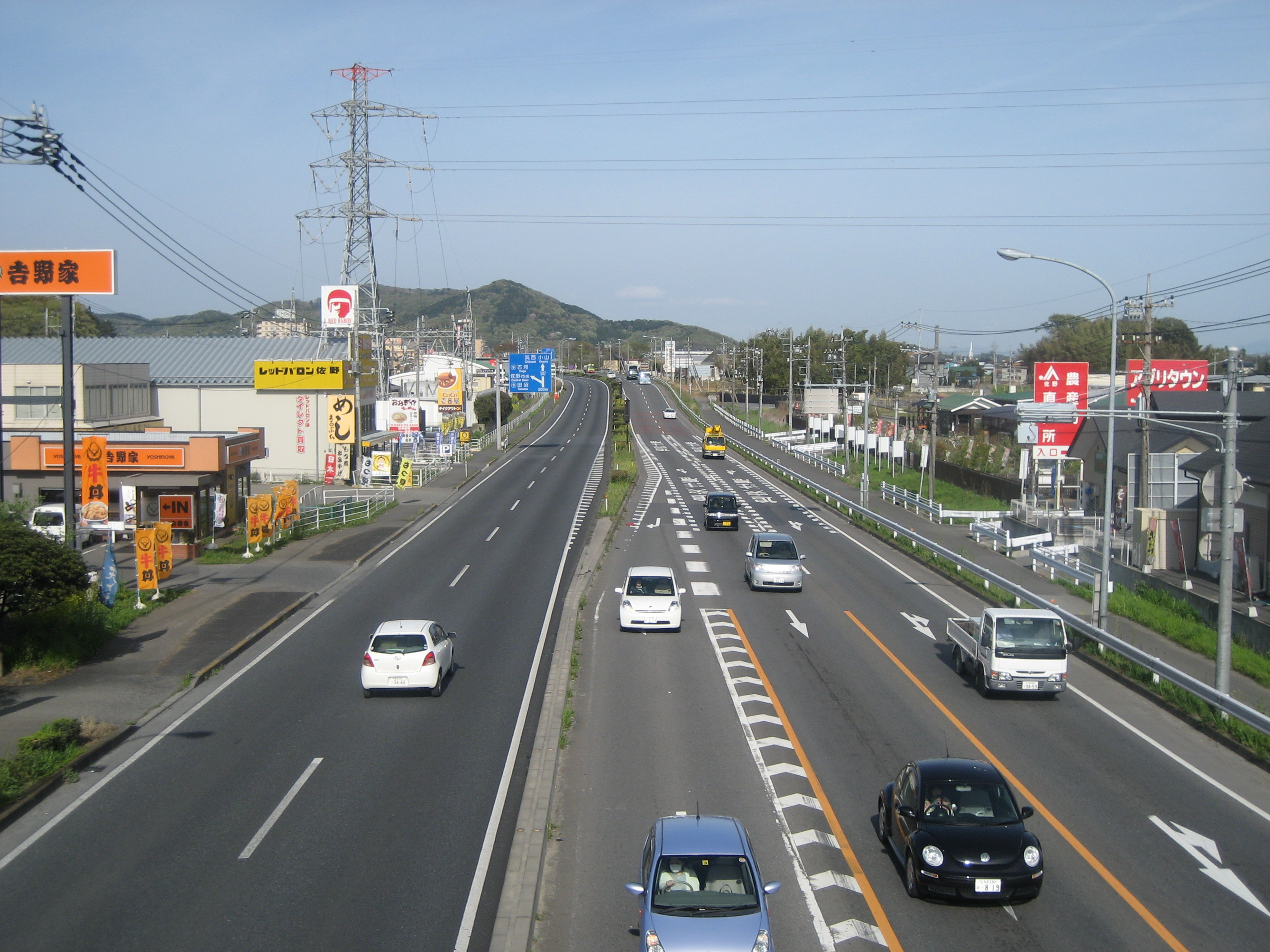 国道50号線佐野市植下町